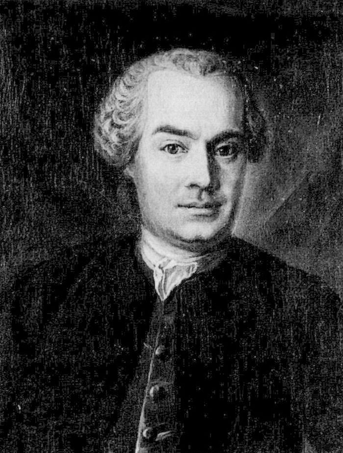 Johan Stenhammar (1769–1799), skald, ledamot av Svenska Akademien. Okänd konstnär.